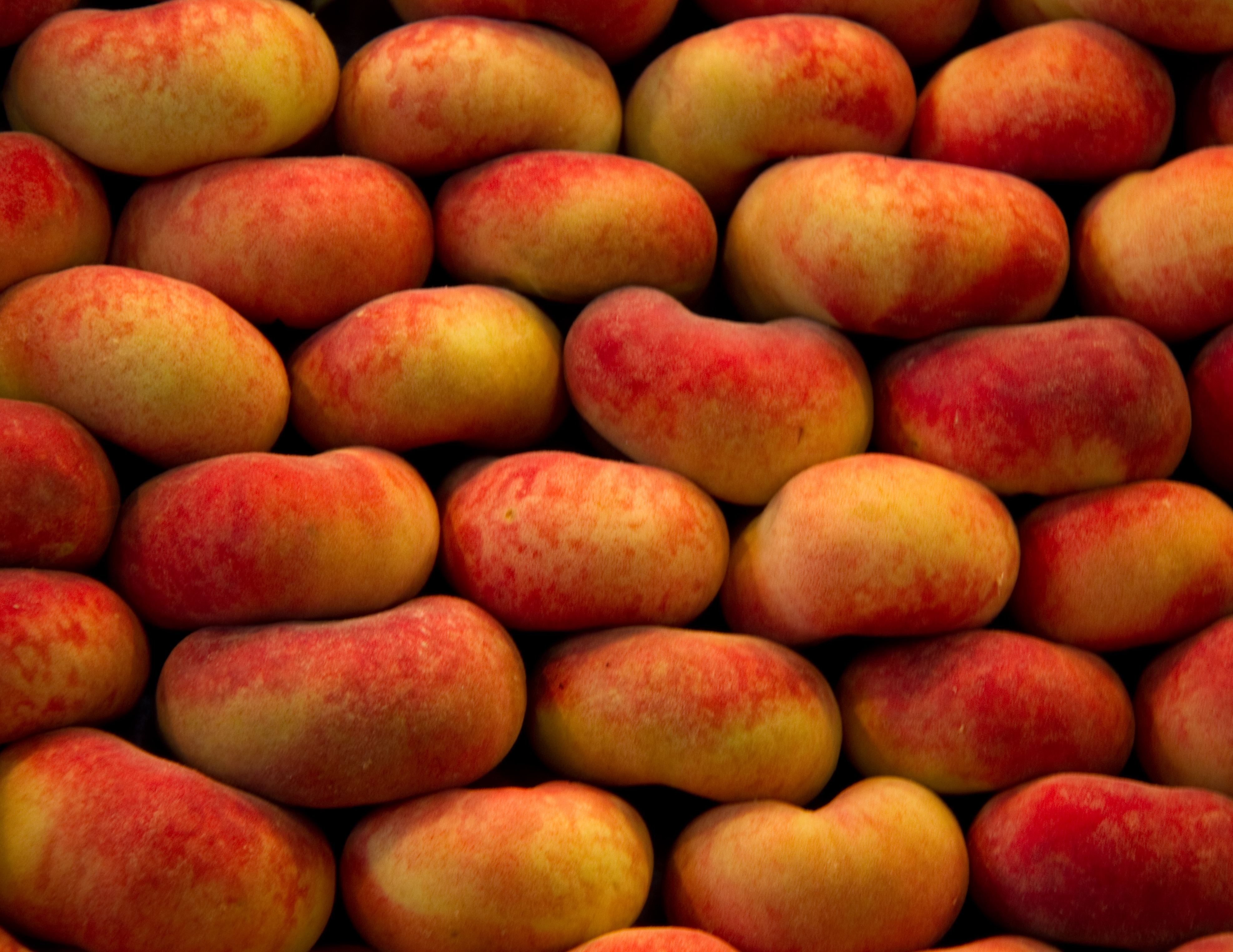 Fruit Wall